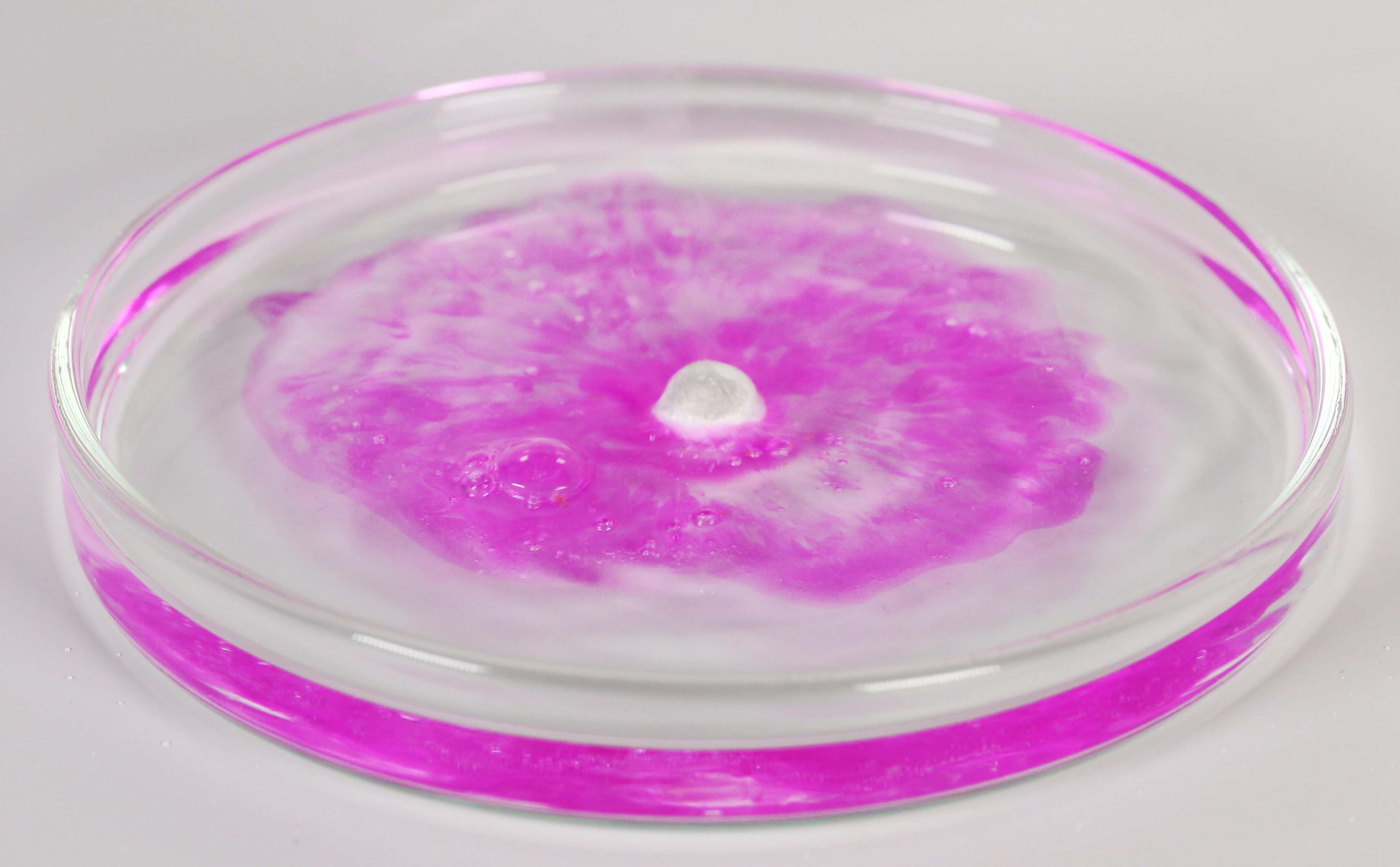 Skakutavi natrijum - ružičasta boja - fenolftalein